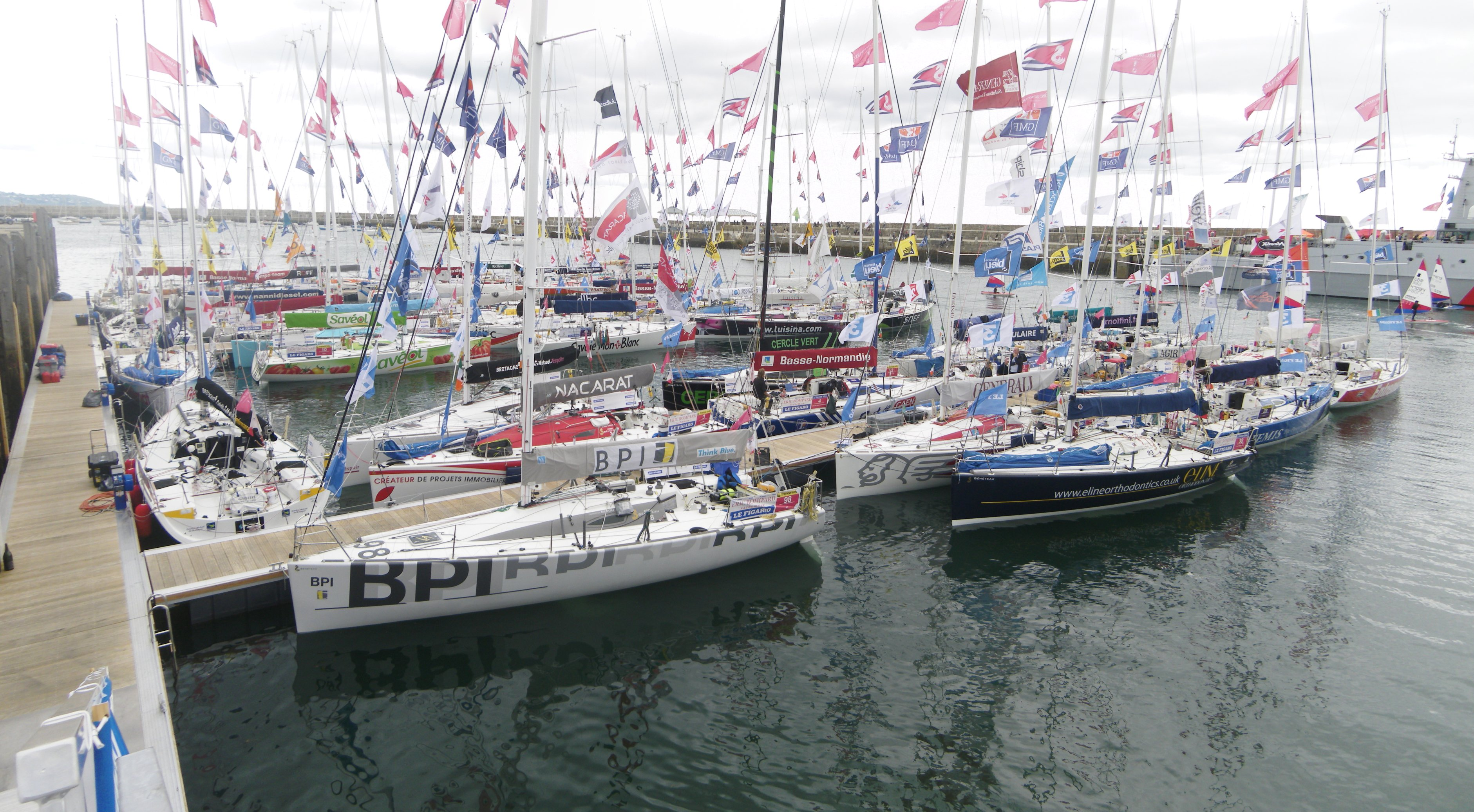 Flotte de la Solitaire du Figaro 2011 à Dún Laoghaire